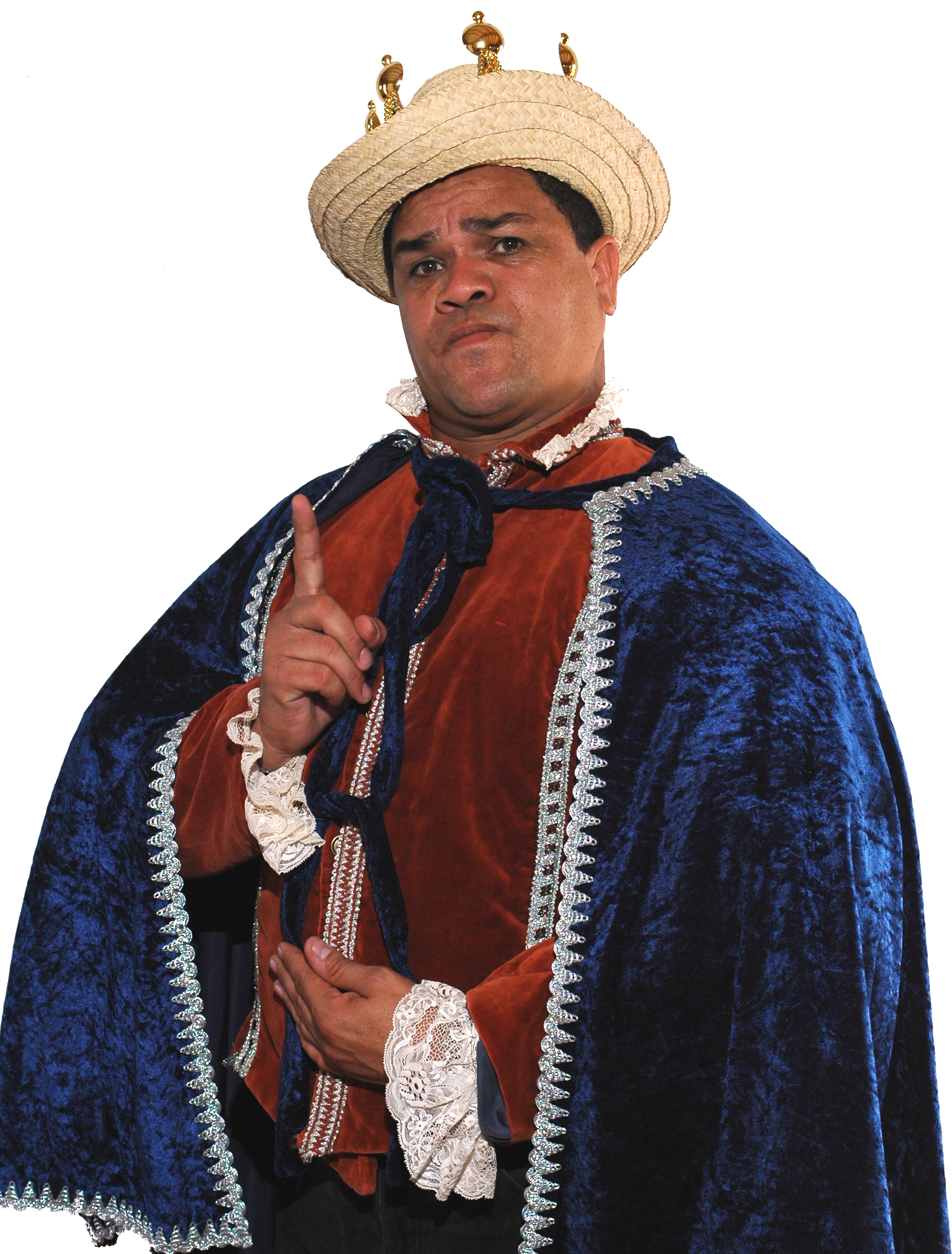 Benjamín Rausseo representando al personaje Policarpio I, principe de Musipán El Reyno, Venezuela